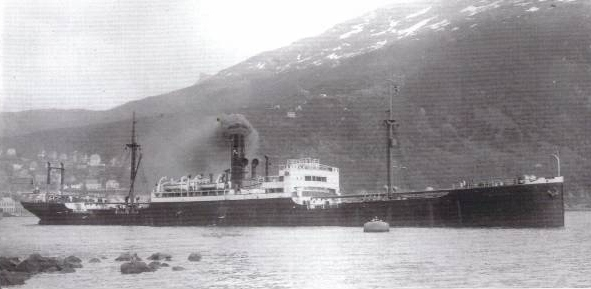 Der Frachter Amerika ex Goldenfels